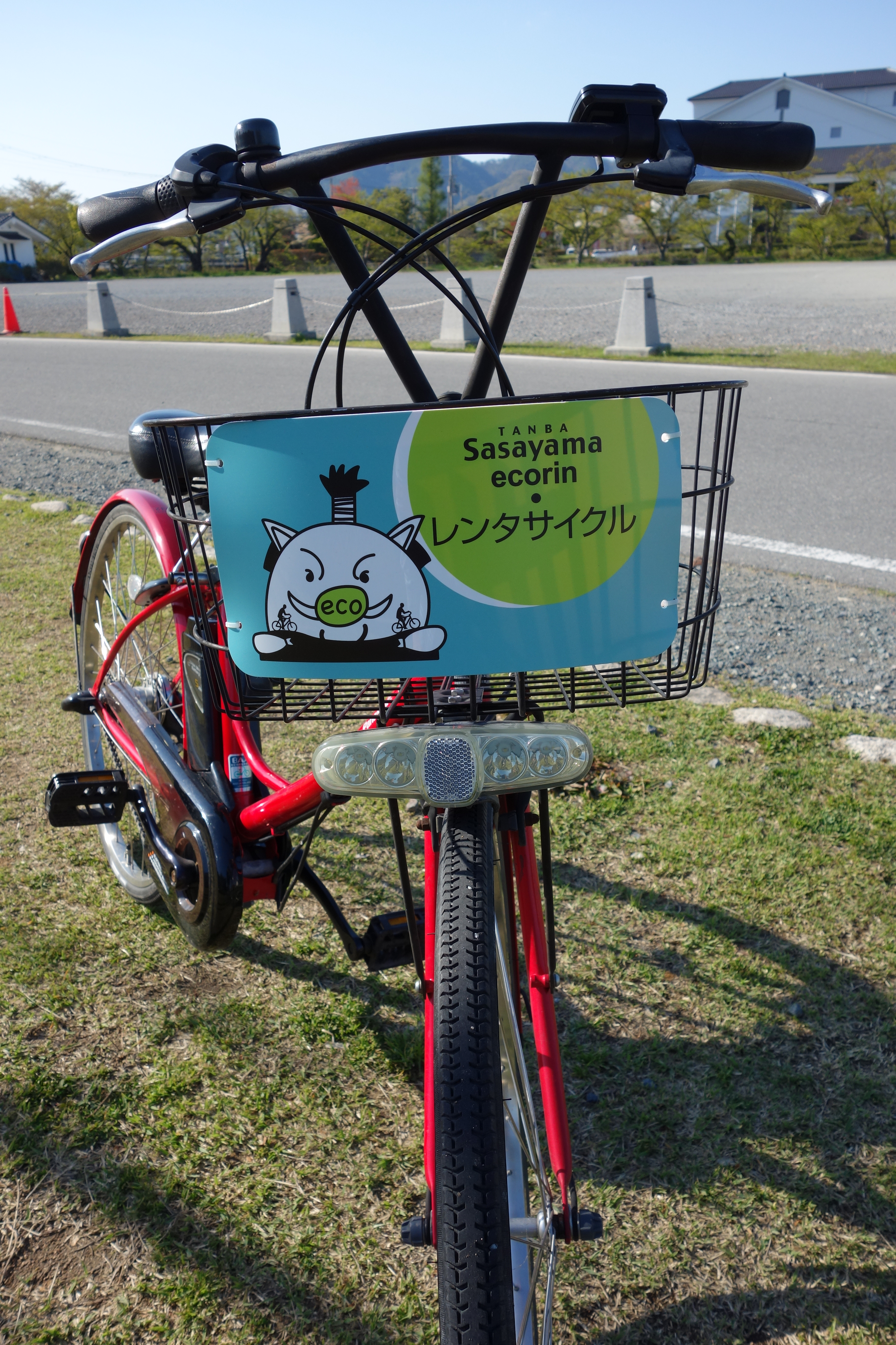 「えこりん」 （レンタサイクル、篠山市） ～丹波篠山えこりんプロジェクト～ 描かれているキャラクターは、篠山市マスコット「まるいの」